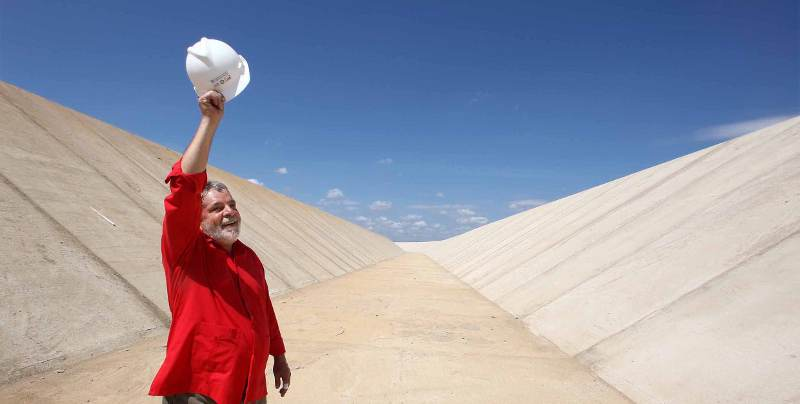 O então presidente Lula em visita as obras da Transposição do Rio São Francisco, em Cabrobó, Pernambuco, Brasil.